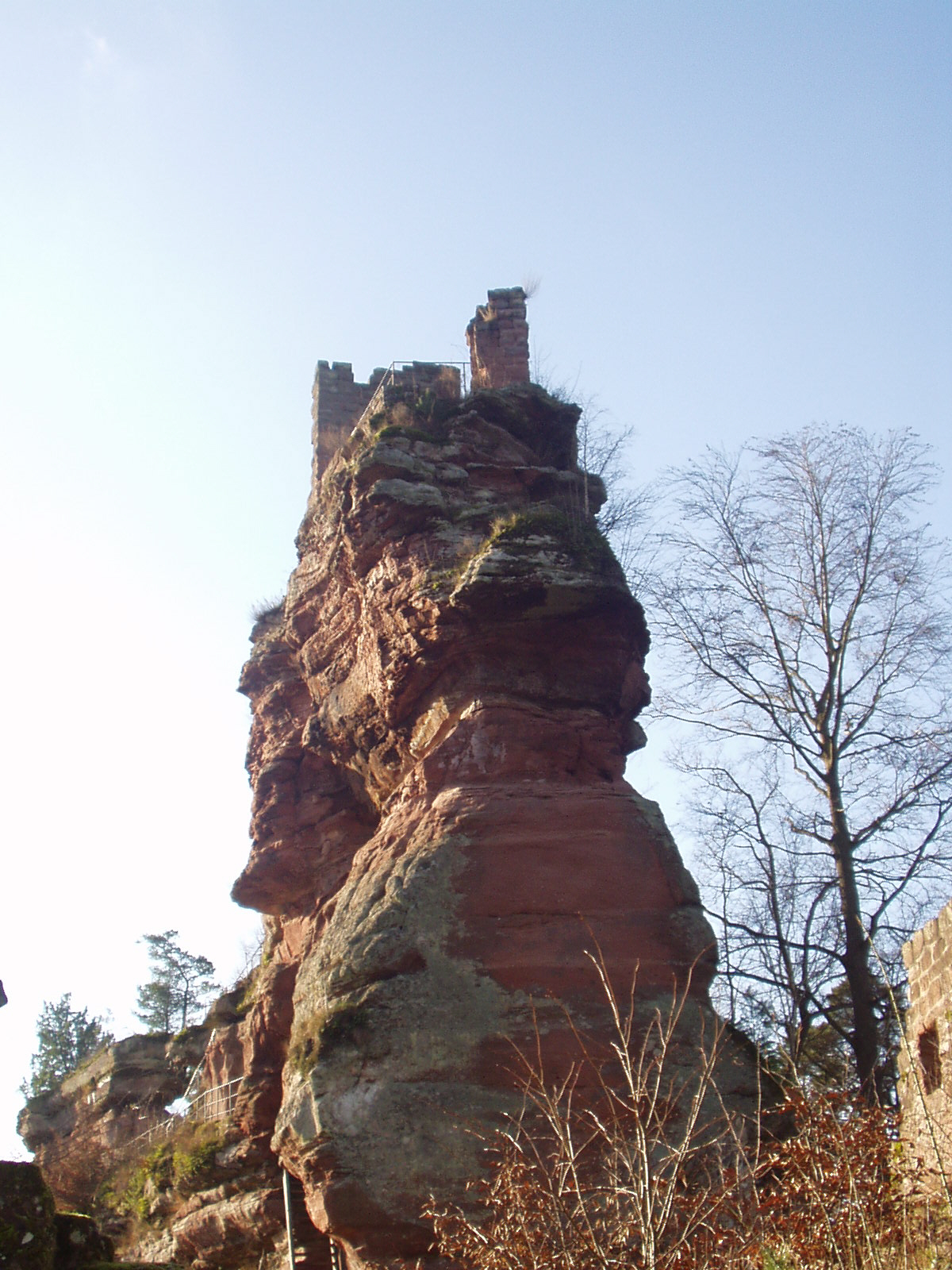 Felsenburgruine Lützelhardt bei Obersteinbach